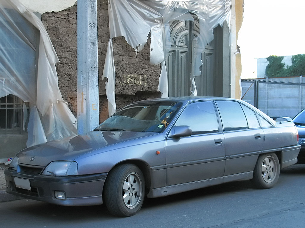 Opel Omega 3000 1988